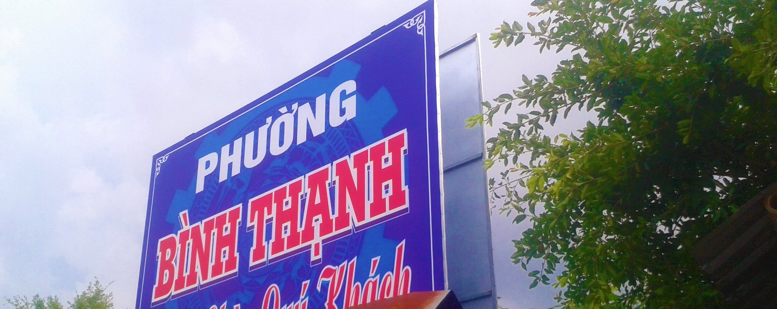 Cổng chào phường